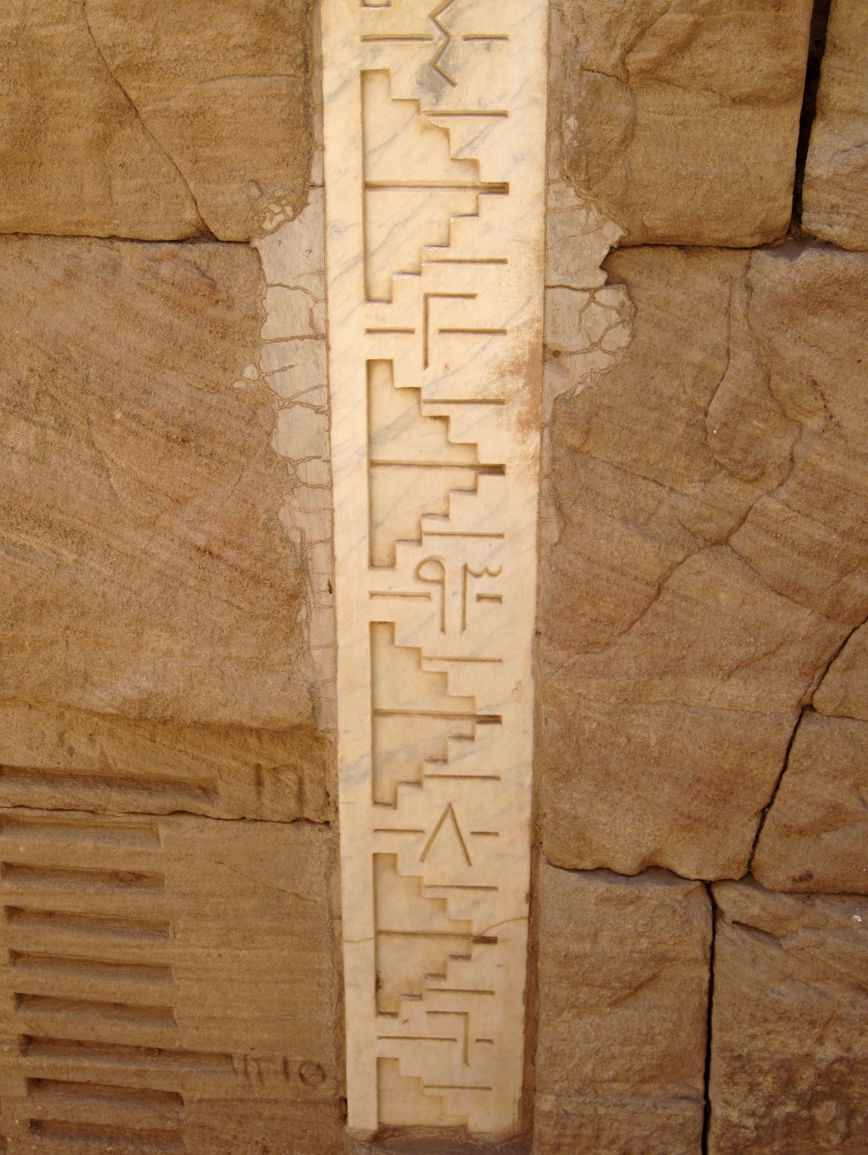 Nilometer an der Südostseite der Insel Elephantine in Assuan, Ägypten